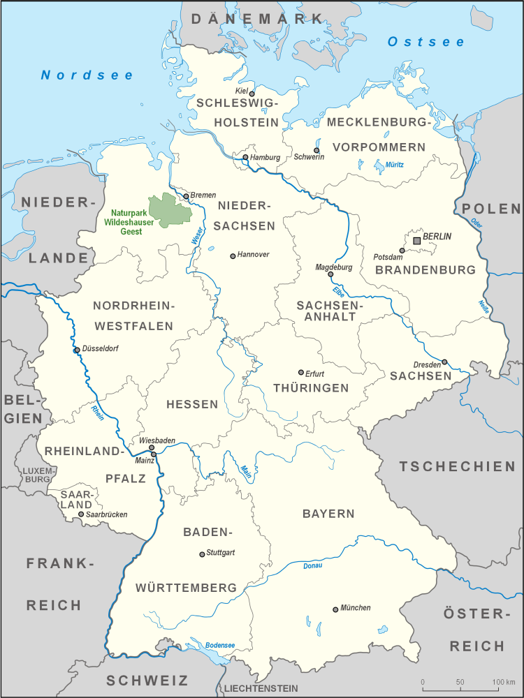 Karte des Naturparks Wildeshauser Geest in Deutschland